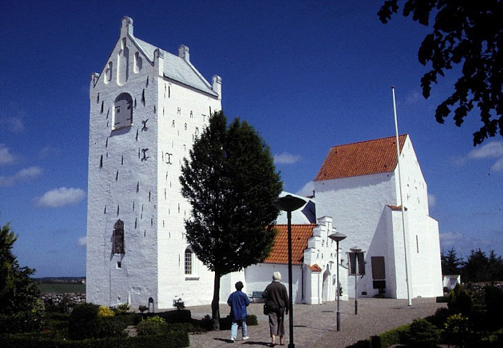 Voer Kirke i Danmark. Voer kirke